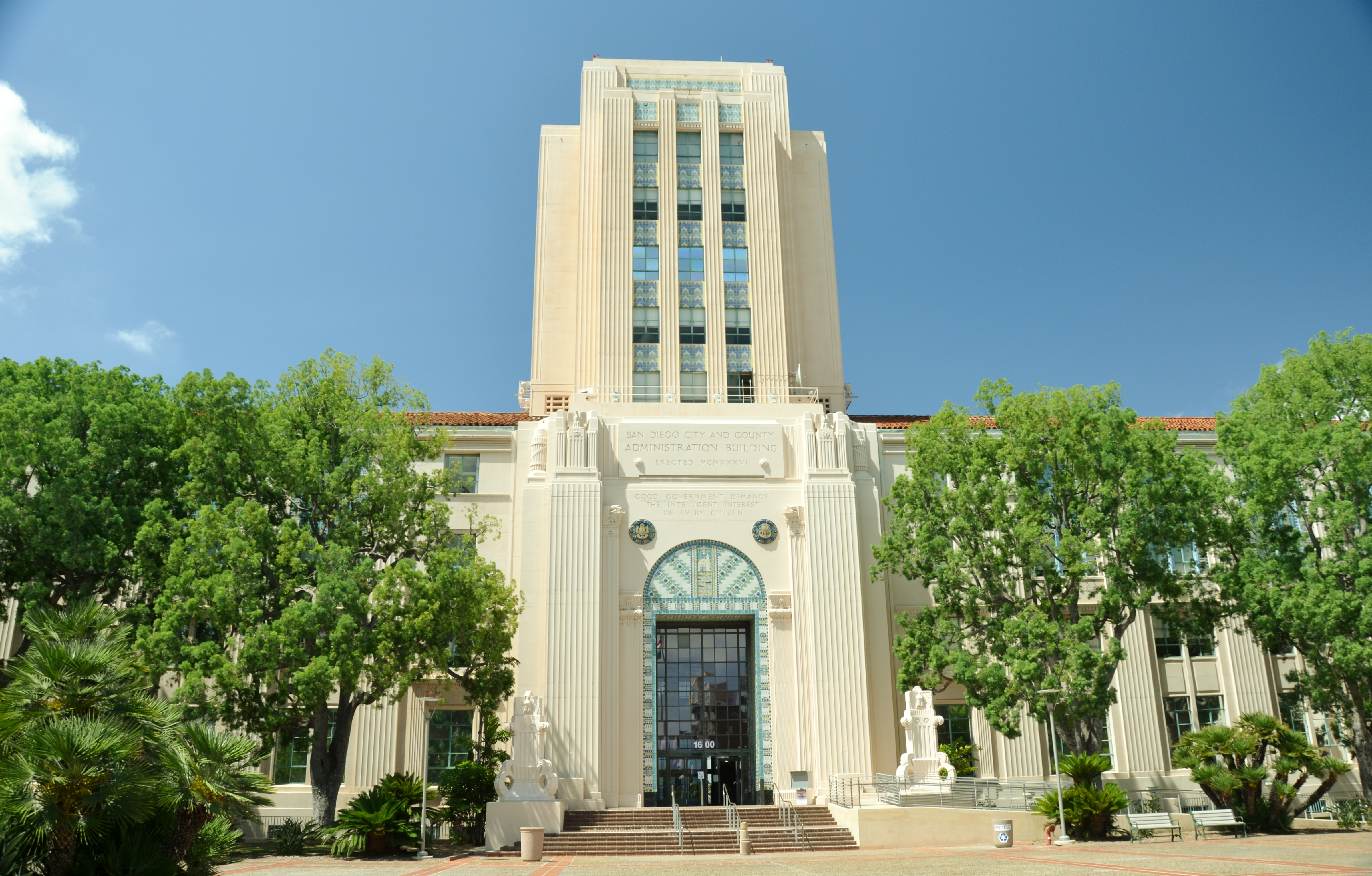 Harborview, San Diego, CA 92101, USA